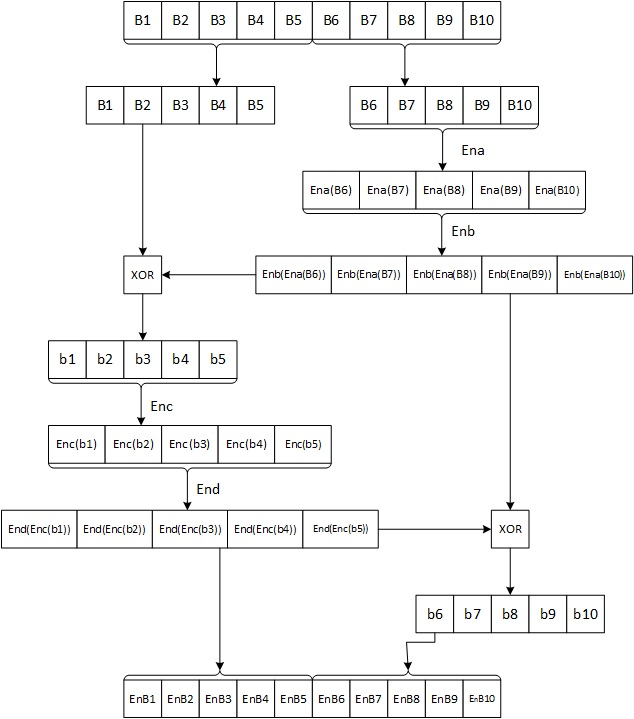 Данная схема описывает фазу переменного анклава криптоалгоритма REDOC II